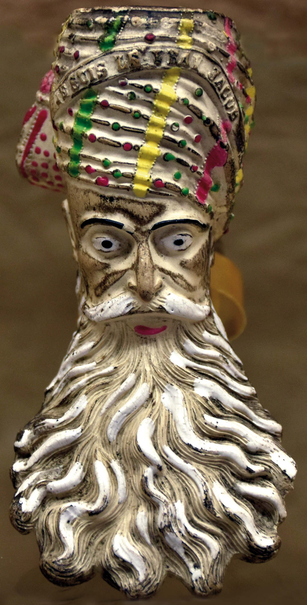 "La Jacob", pipe en terre, produite en grand nombre par les établissements Gambier au 19ème siècle, et représentant le patriarche biblique Jacob. Texte sur le turban : "Je suis le vrai Jacob", pour lutter contre les imitations. Outre le succès des têtes de vieillards et des têtes orientales comme motif pour les fourneaux de pipe, la longue barbe permettait au fumeur de tenir la pipe sans se brûler, d'où la popularité du modèle. Musée de la Pipe et du Diamant, à Saint-Claude.